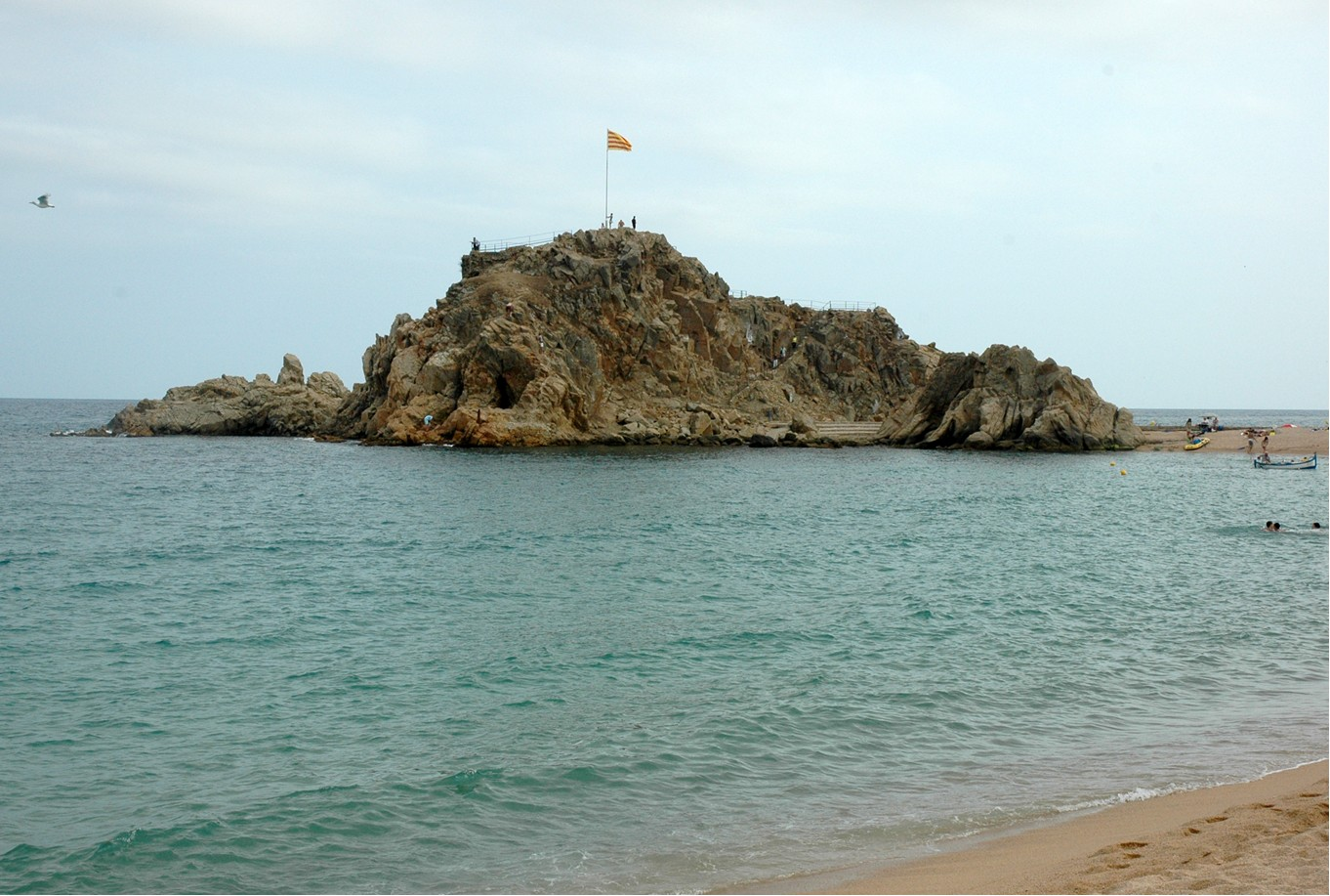 Sa Palomera, Blanes, Girona, (Catalunya).